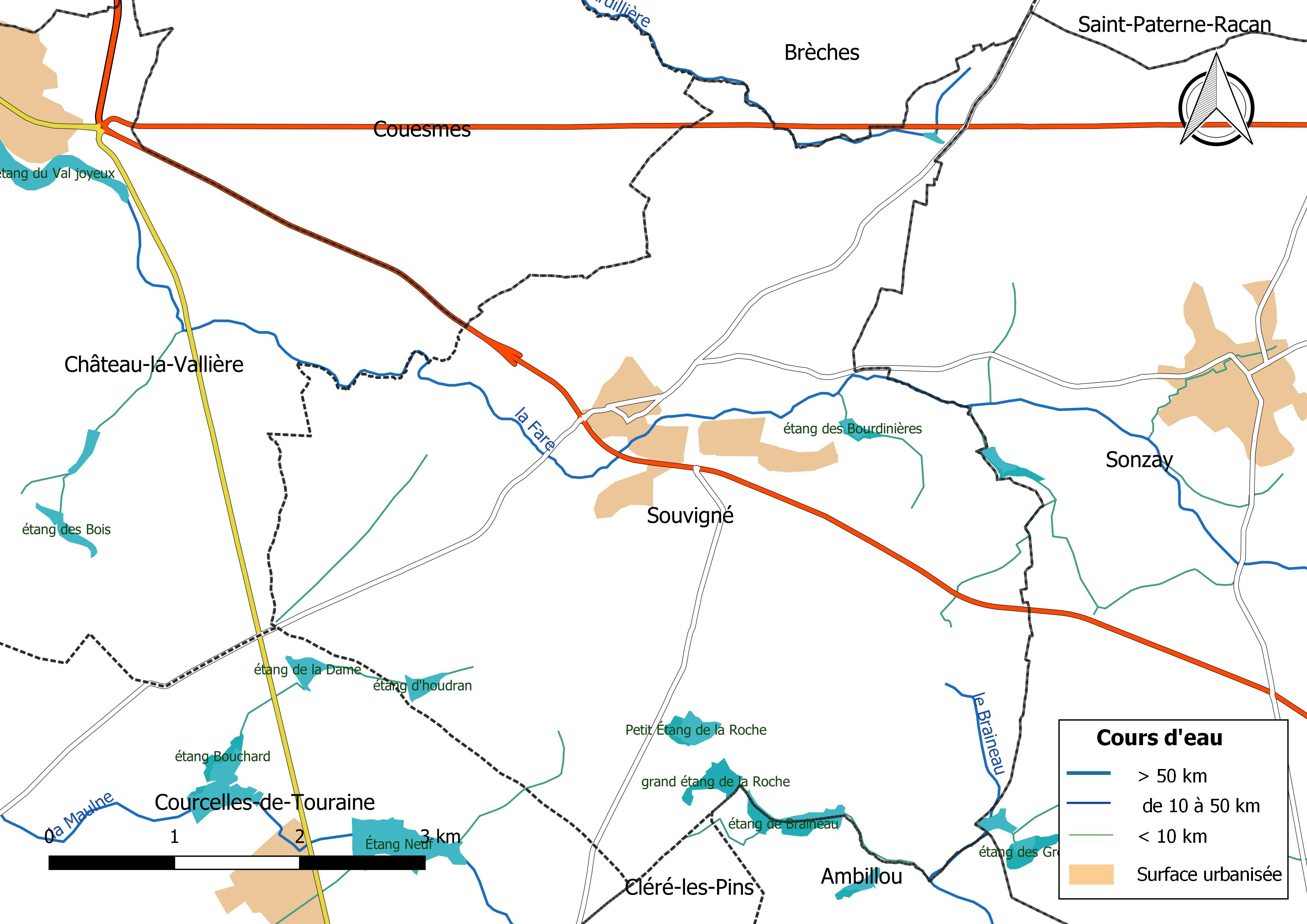 Carte du réseau hydrographique de la commune de Souvigné (Indre-et-Loire) (France).